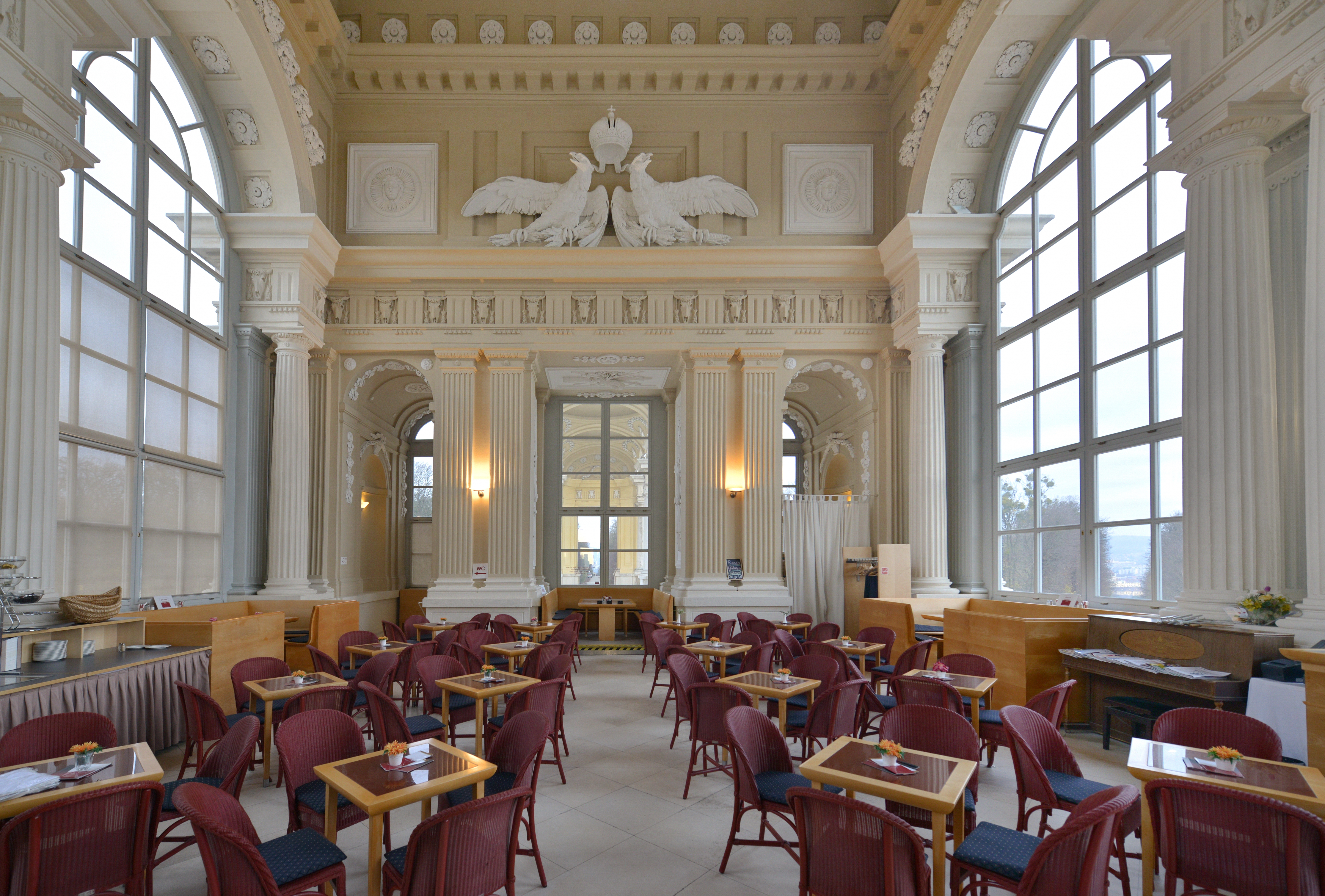 Cafe Gloriette (Wien).